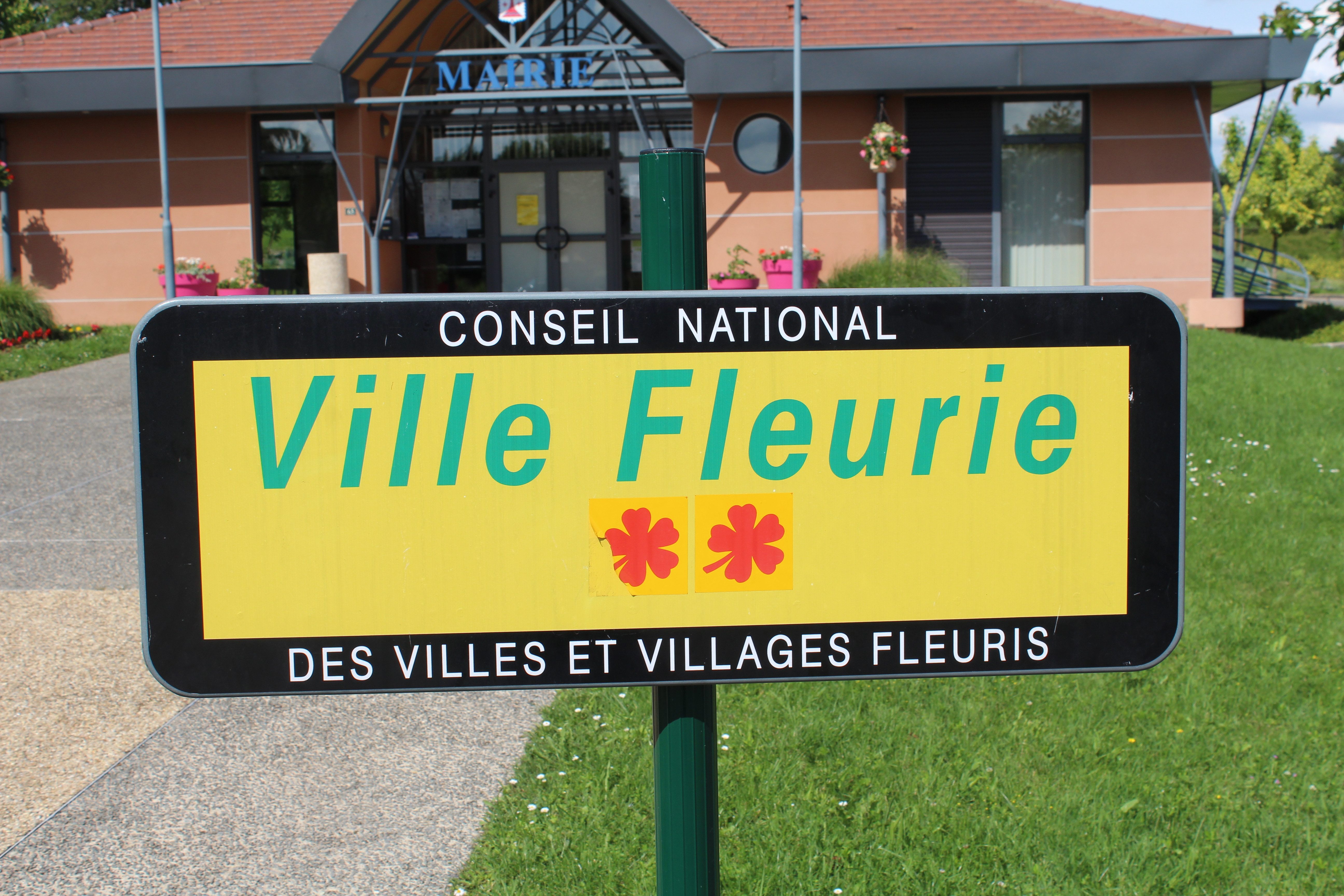 Panneau Ville fleurie à deux fleurs vers la mairie de Saint-Cyr-sur-Menthon.